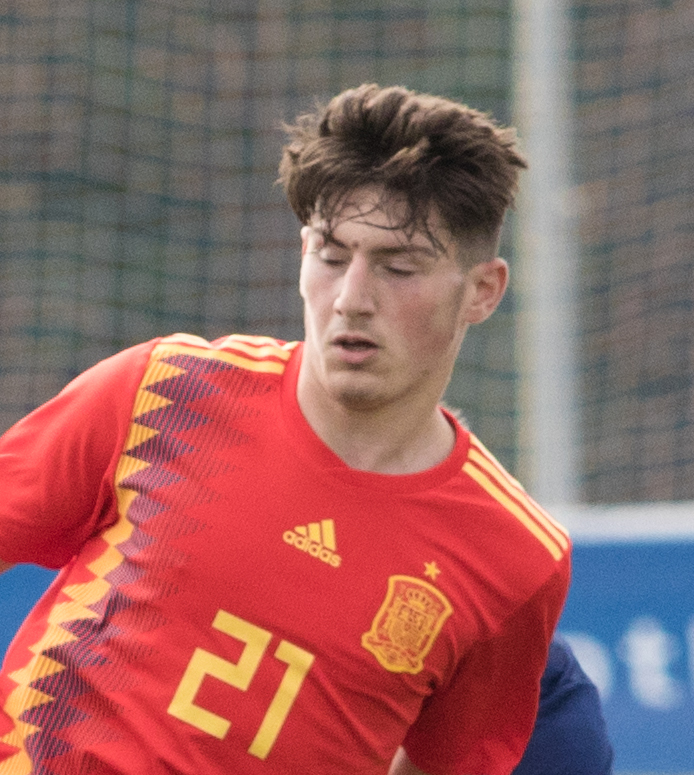 Unai Vencedor